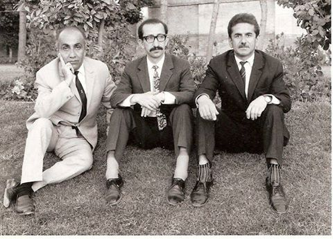 این عکس متعلق به استاد هارون شفیقی می باشد و از آلبوم ایشان برگرفته شده است.